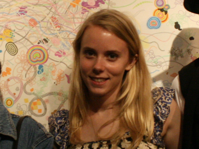 Jen Stark